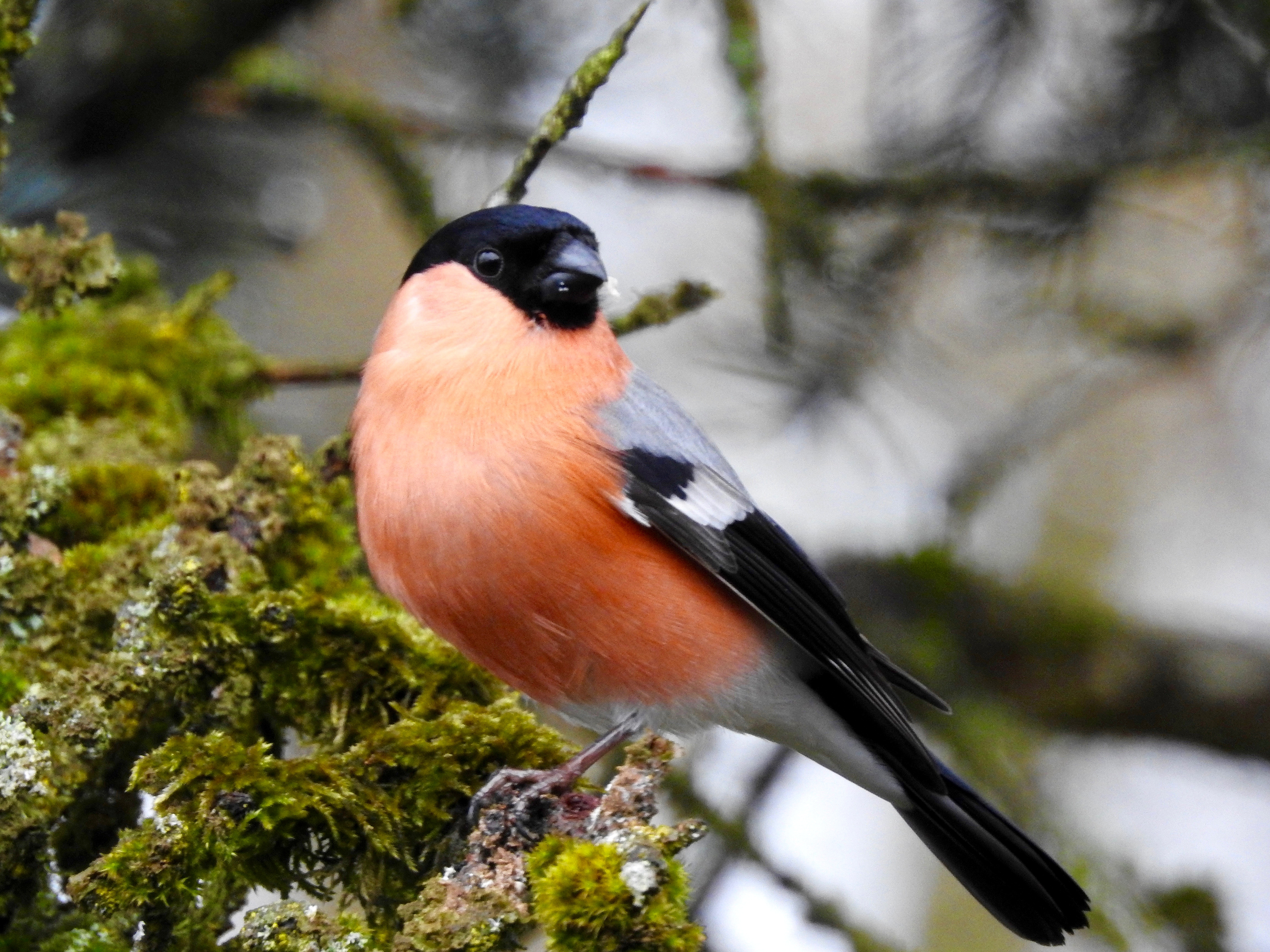 Starnberg, OT Landstetten. Dompfaff (Männchen) im Klosterhölzl, einem Wald auf den Moränenhügeln zwischen Starnberger See und Ammersee. LSG „Westlicher Teil des Landkreises Starnberg“ (LSG-00542.01).